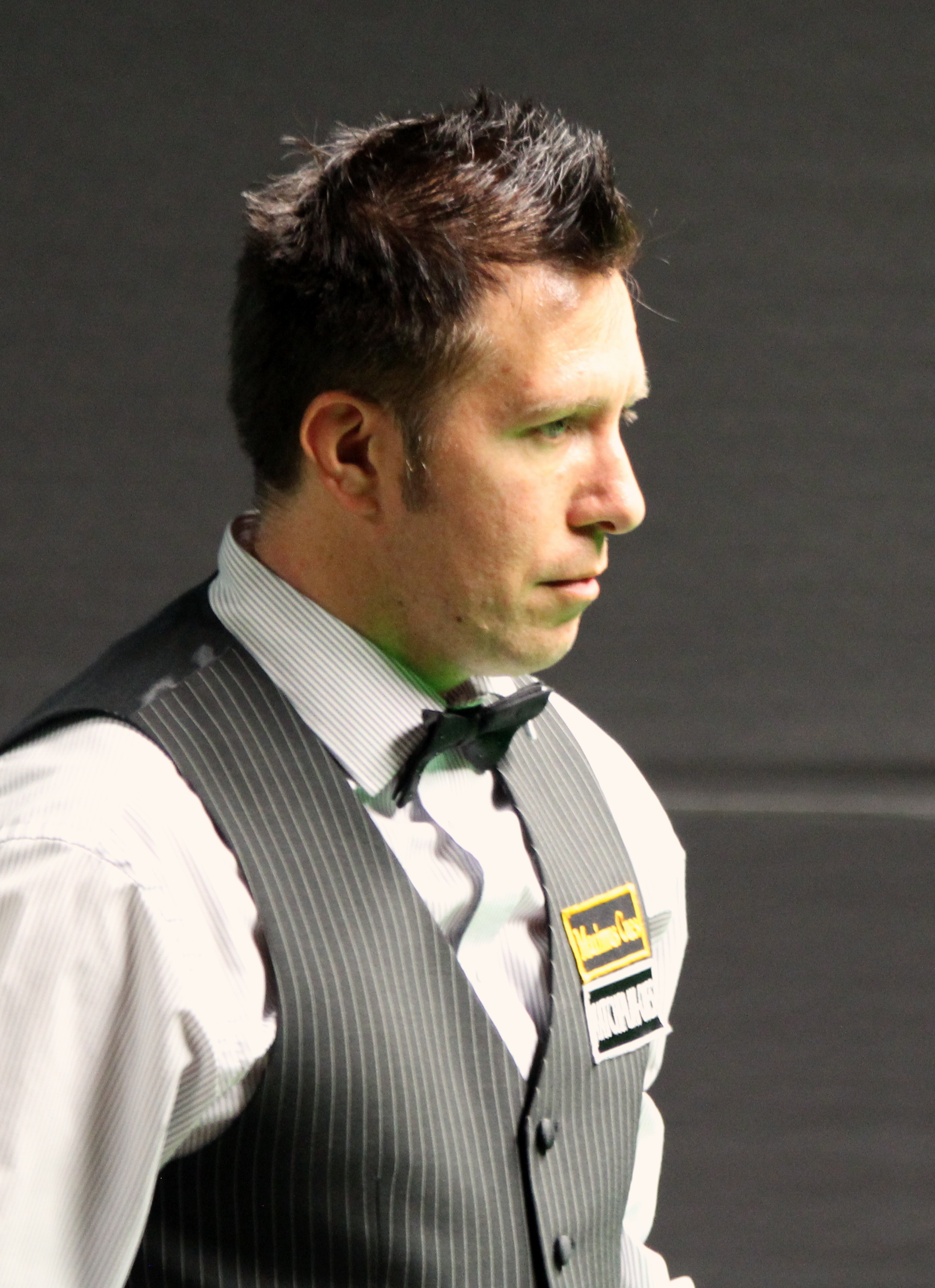 Dominic Dale beim Paul Hunter Classic 2016